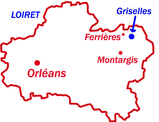 La situation de Griselles dans le Loiret